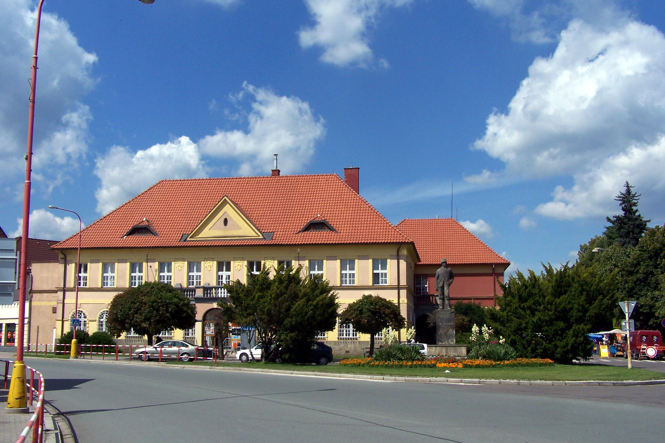 Pošta v Holicích.